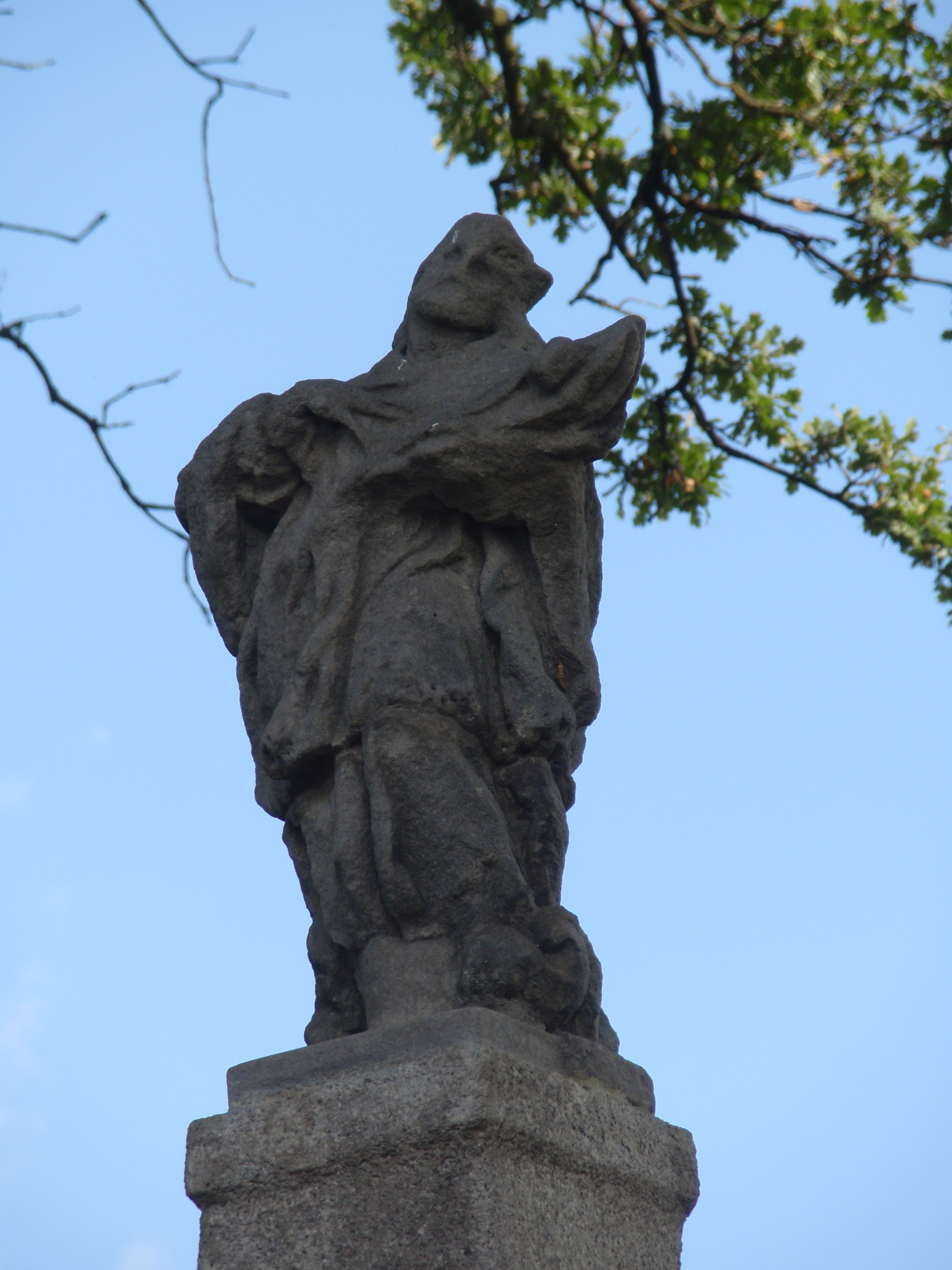 Socha sv. Jana Nepomuckého (Krásněves), nad silnicí, Krásněves